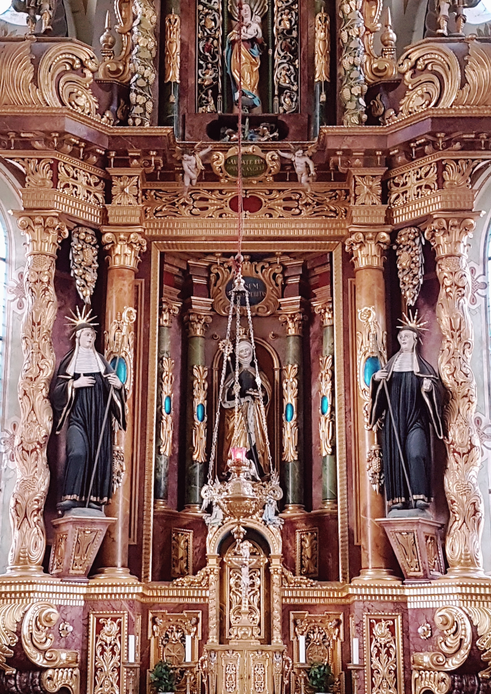 Hörmannshofen (Biessenhofen), Detail des spätbarocken Hochaltar.